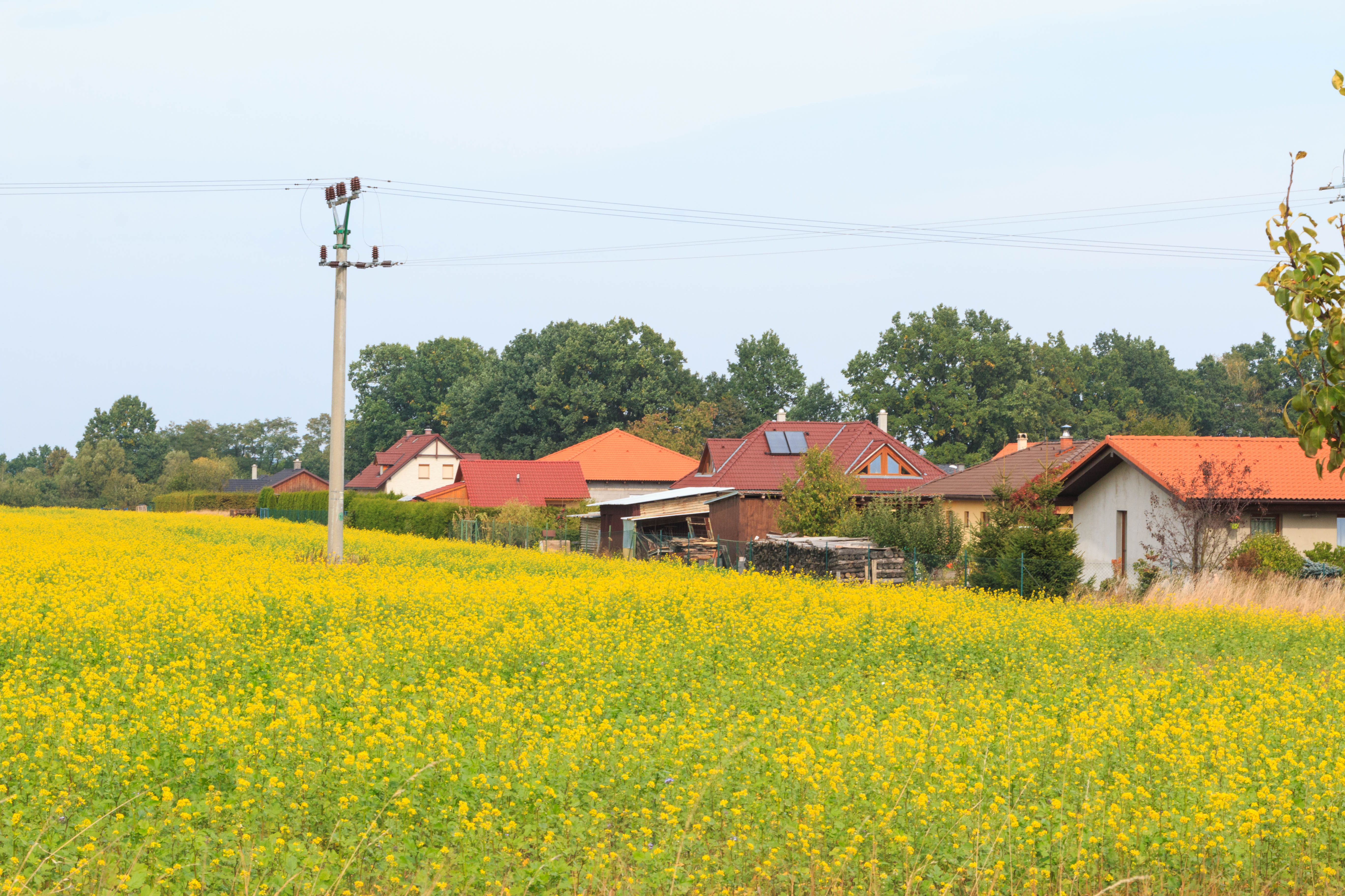 Chloumek u Újezdu u Chocně